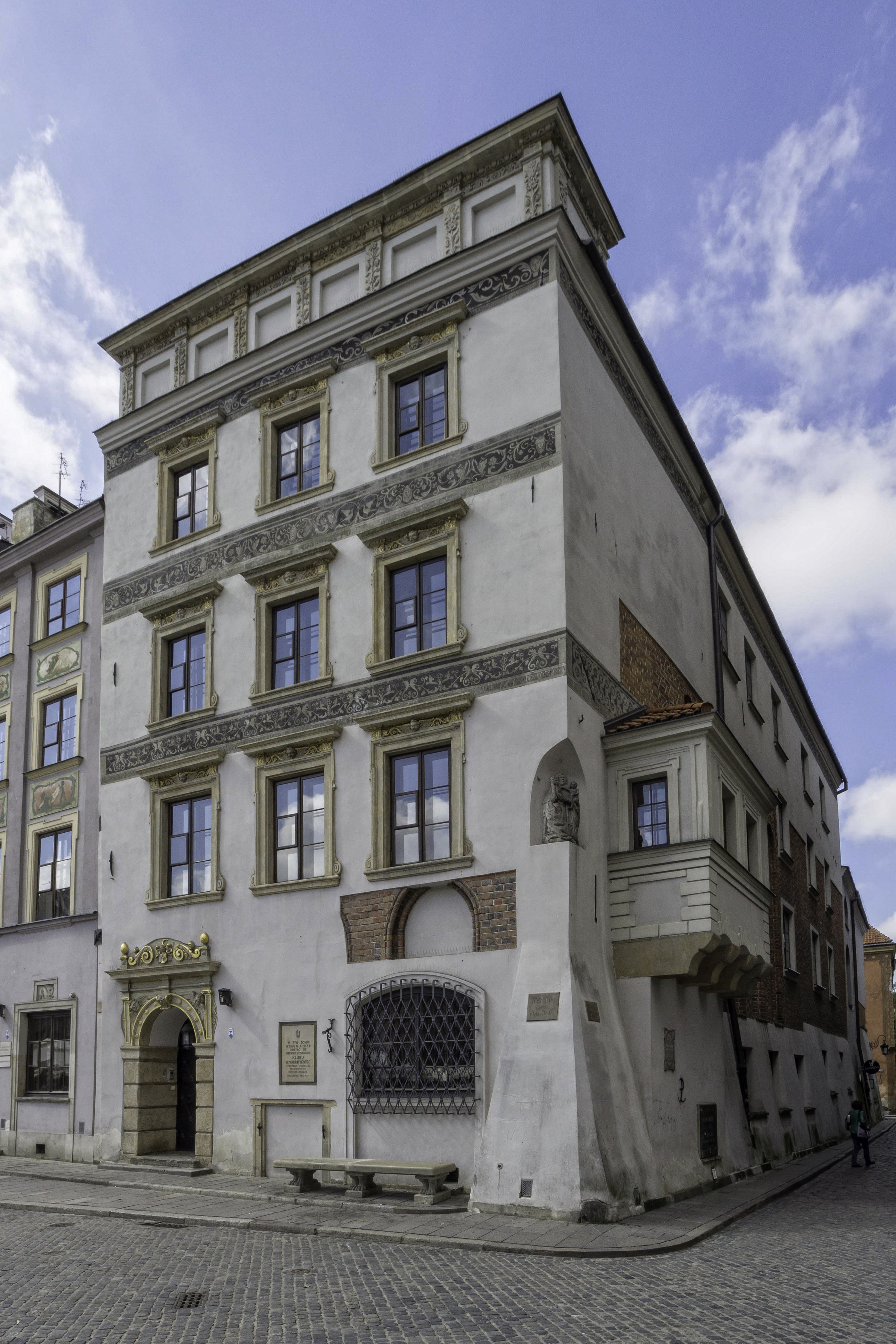 Warszawa, kamienica pod św. Anną, Rynek Starego Miasta 31